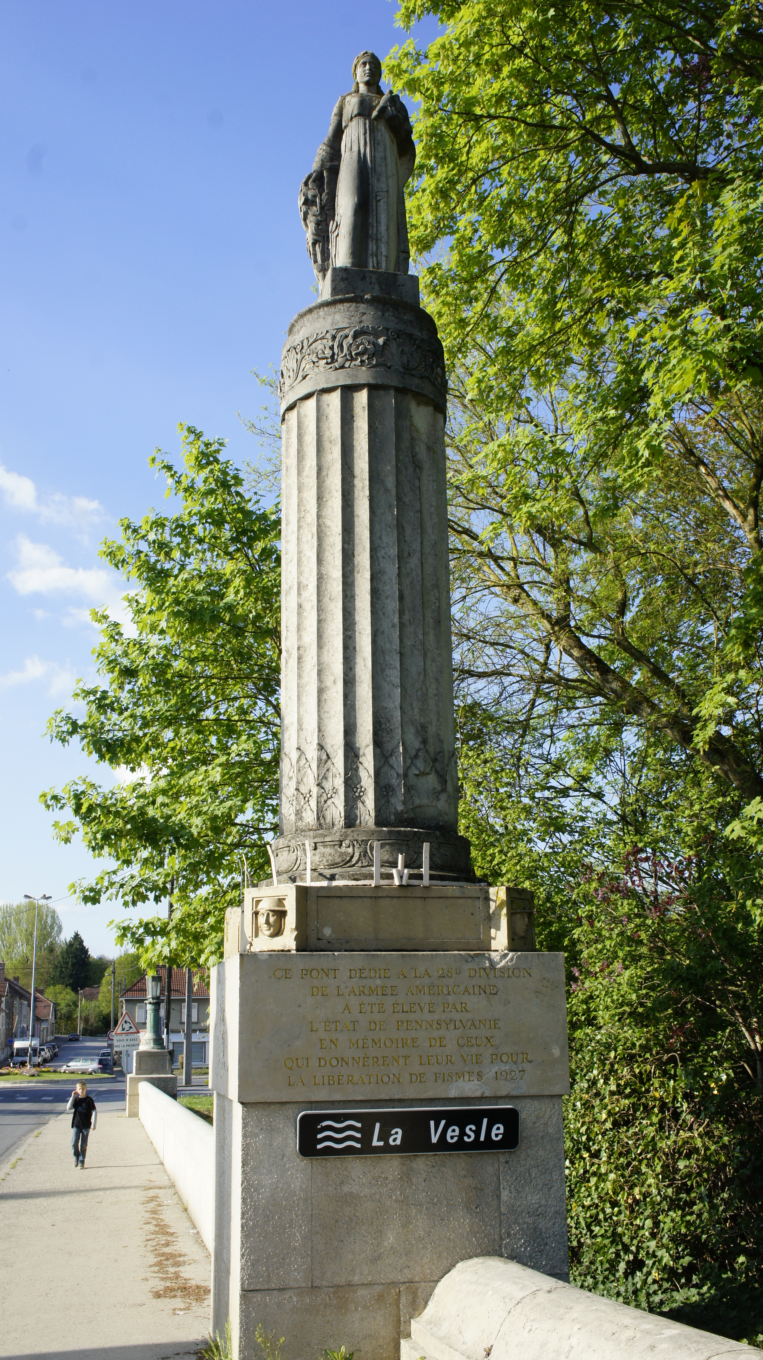 Pont de la 28 division américaine à FIsmes .